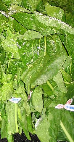 Turnip greens at Kroger.